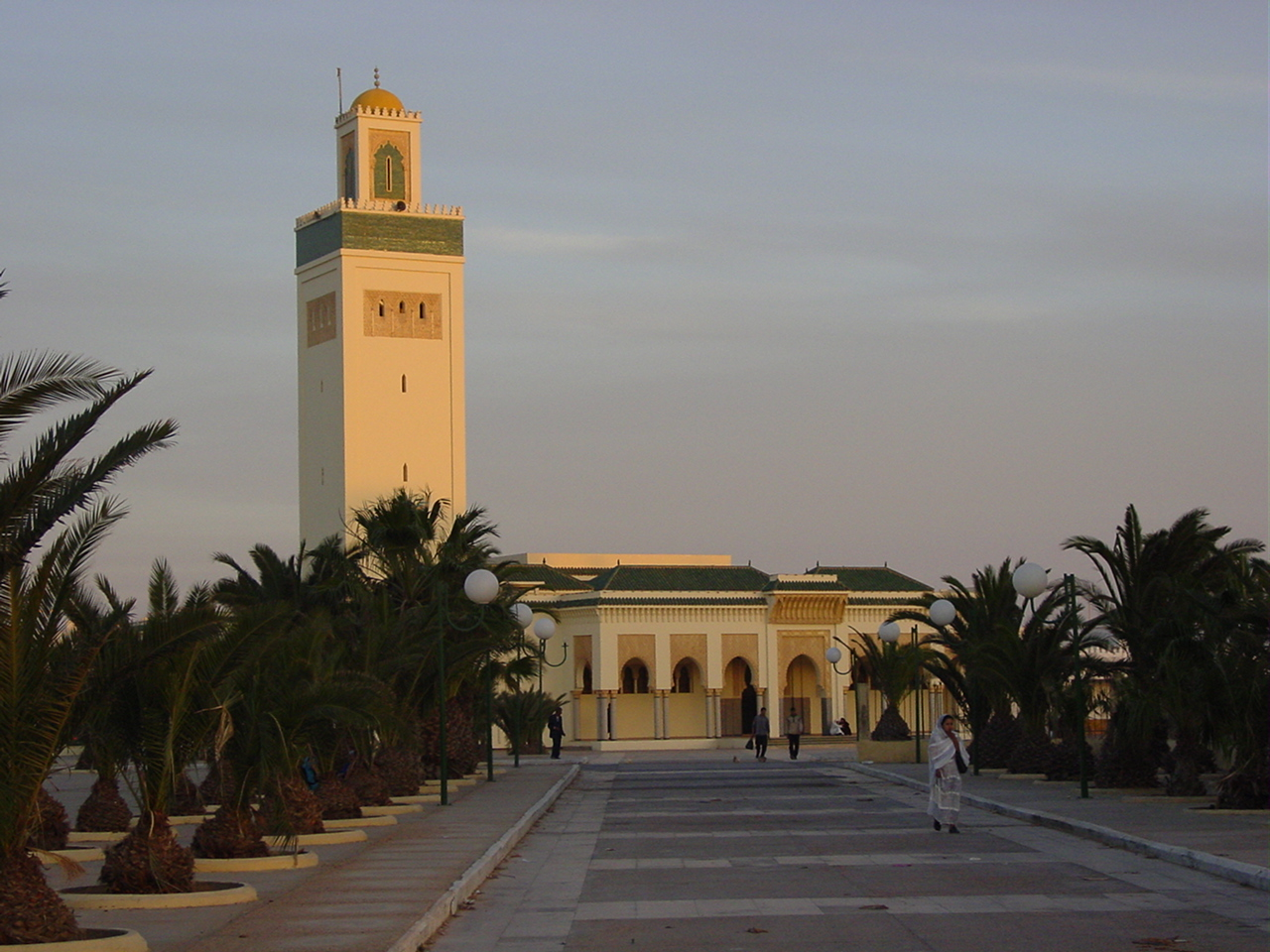 Mezquita junto a la plaza de la Marcha Verde en El Aaiún, capital del Sahara Occidental.